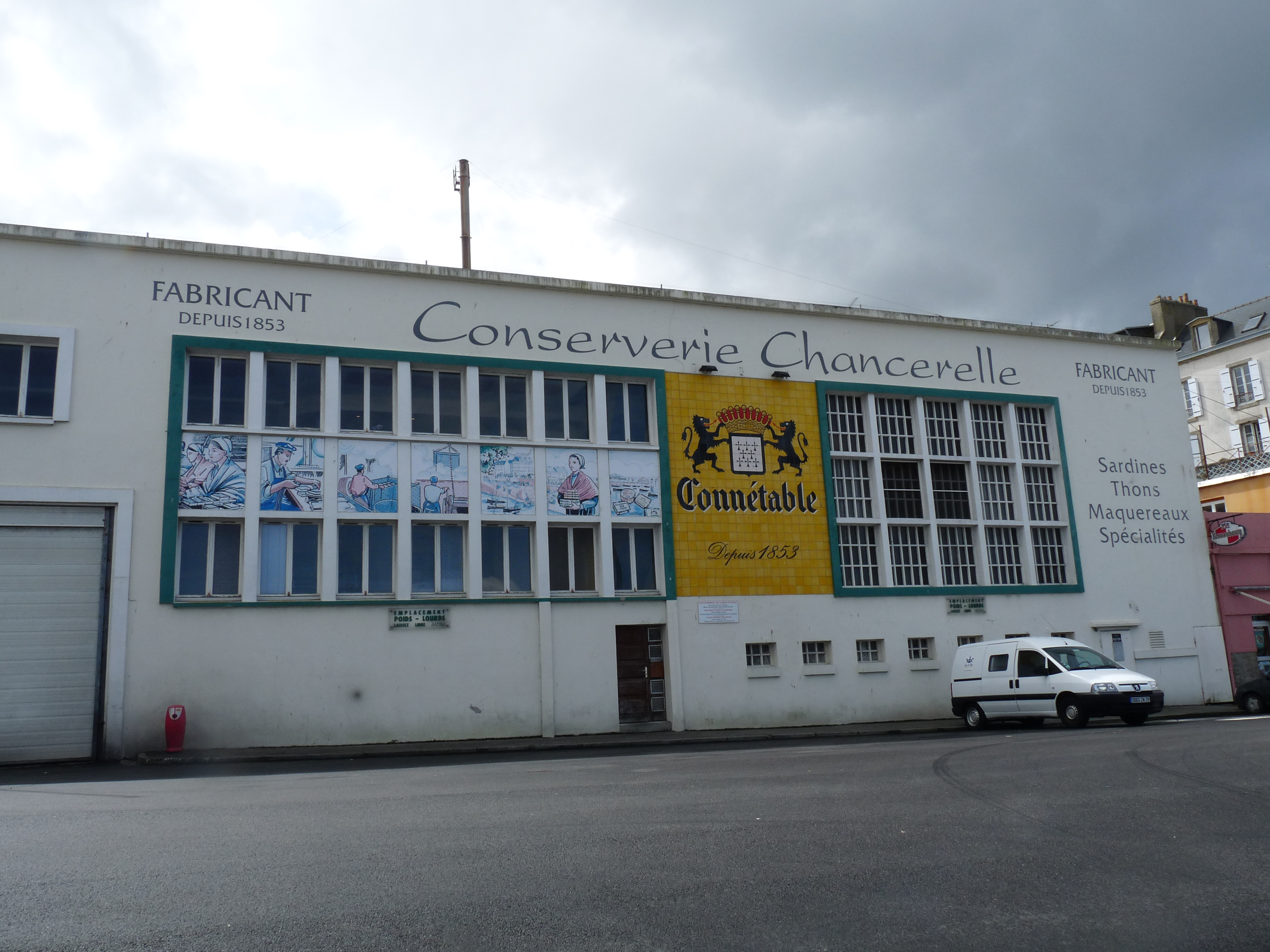 Conserverie Chancerelle (Connétable) à Douarnenez (Finistère)